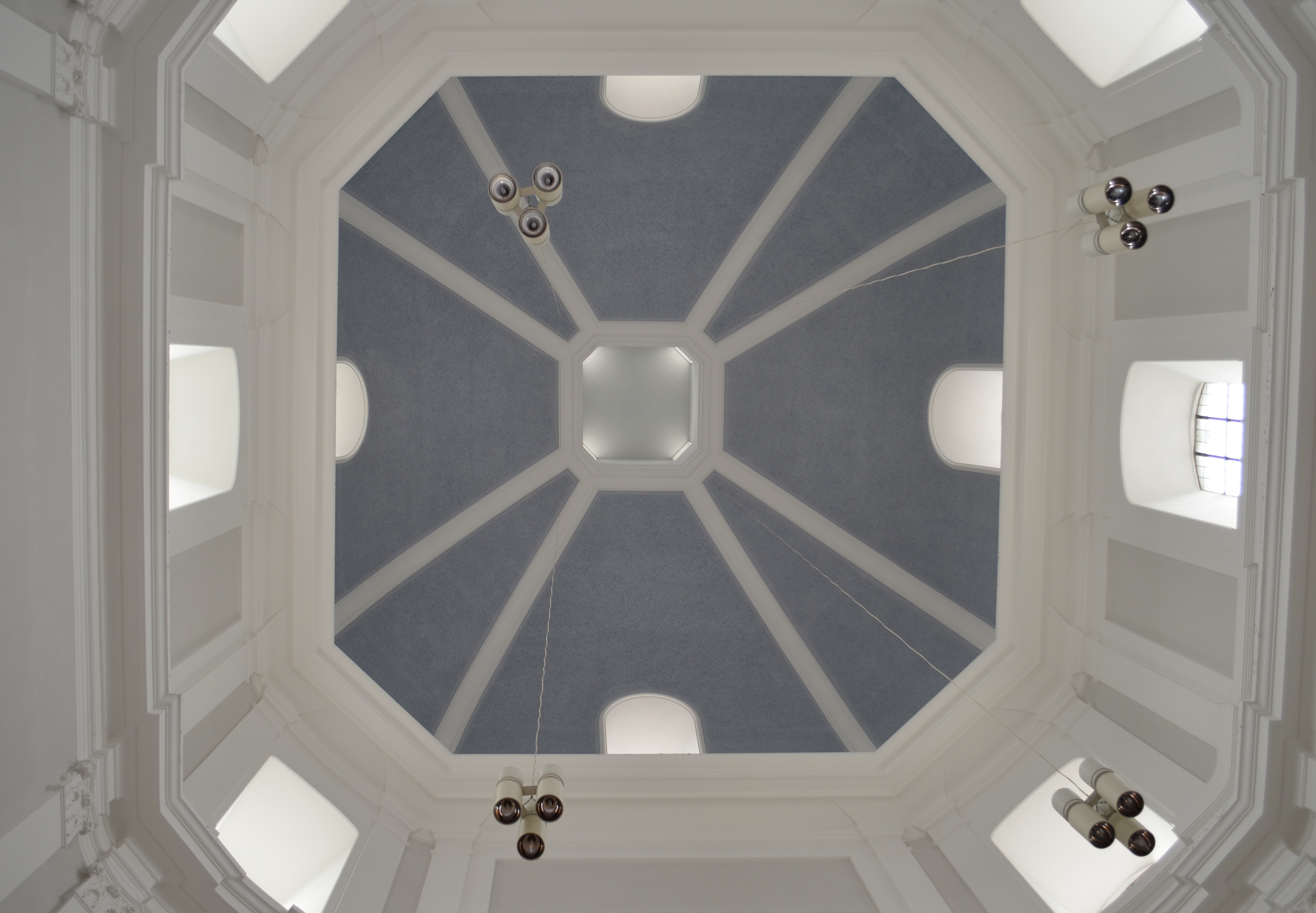 Kuppel der Kirche St. Johann Baptist in Aachen-Burtscheid